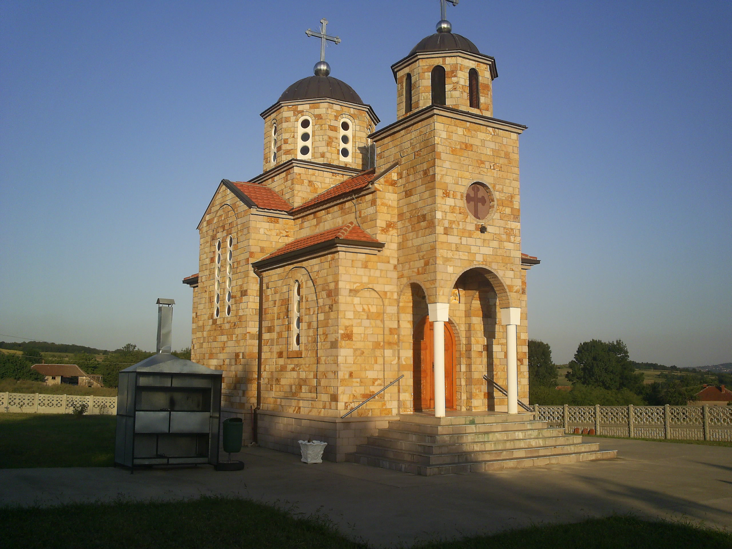 Црква Светог Ђорђа у Црном Калу (Баточина).